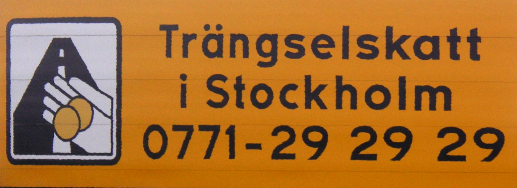 Skylt "Trängselskatt" i Stockholm